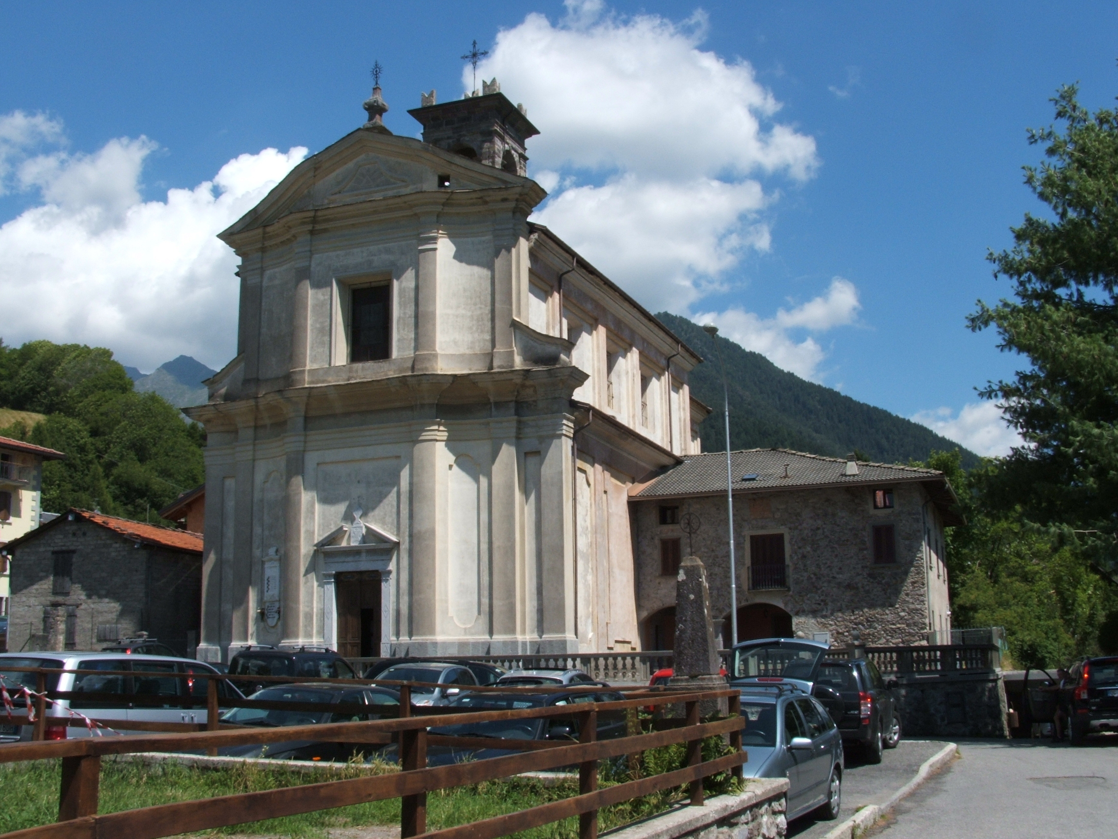 Chiesa di Barzesto - Schilpario (BG)